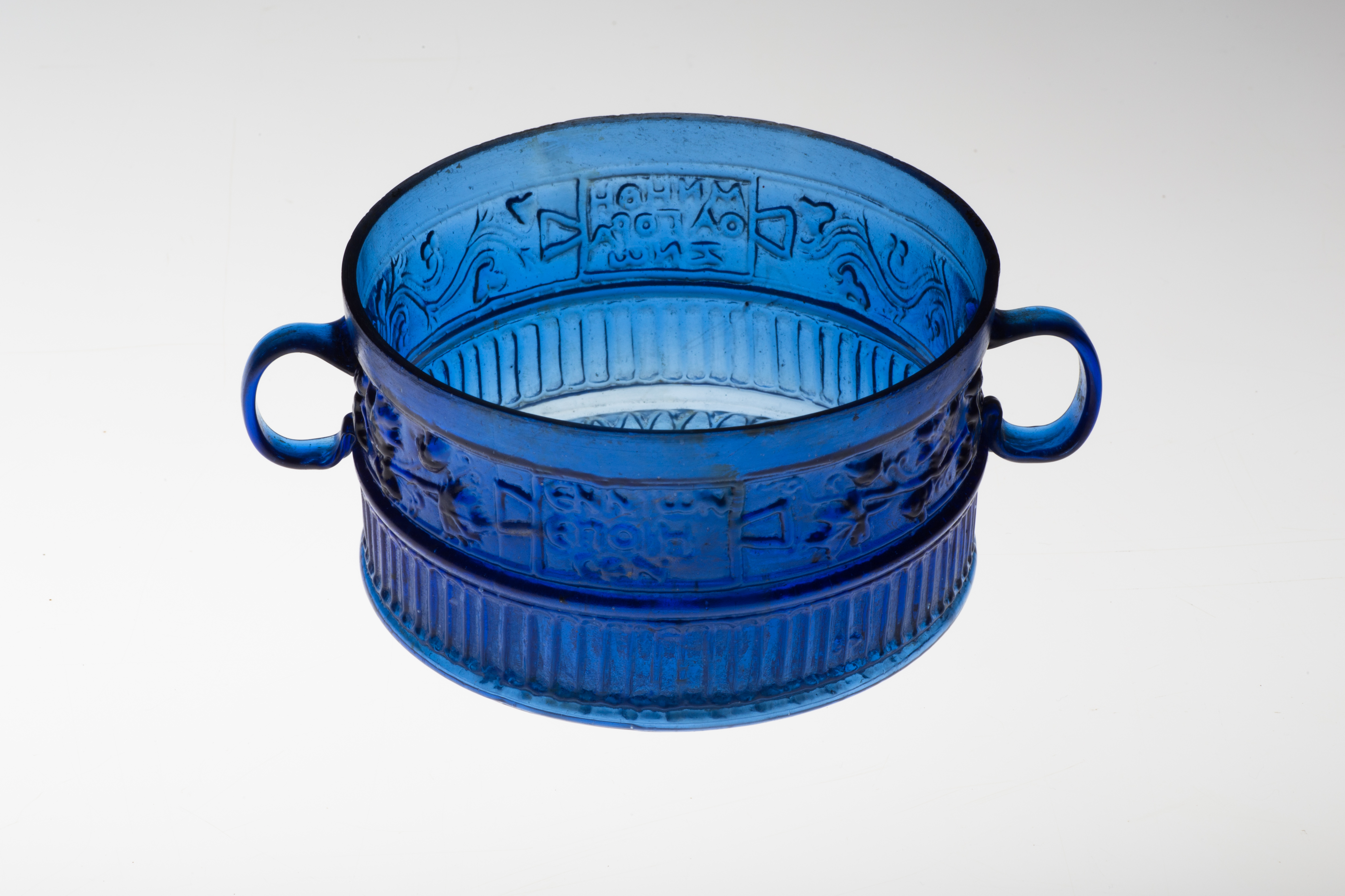 Una delle due coppe in vetro che recano il cartiglio con il nome del vetraio siro-palestinese che ha prodotto l'oggetto.